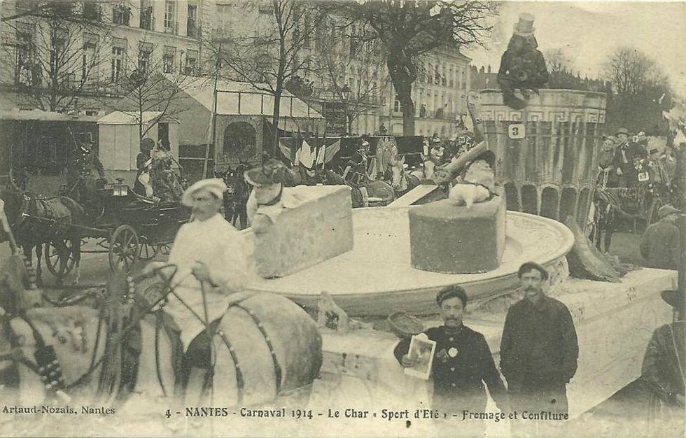 Char Sport d'Eté - Fromage et Confiture au Carnaval de Nantes 1914.